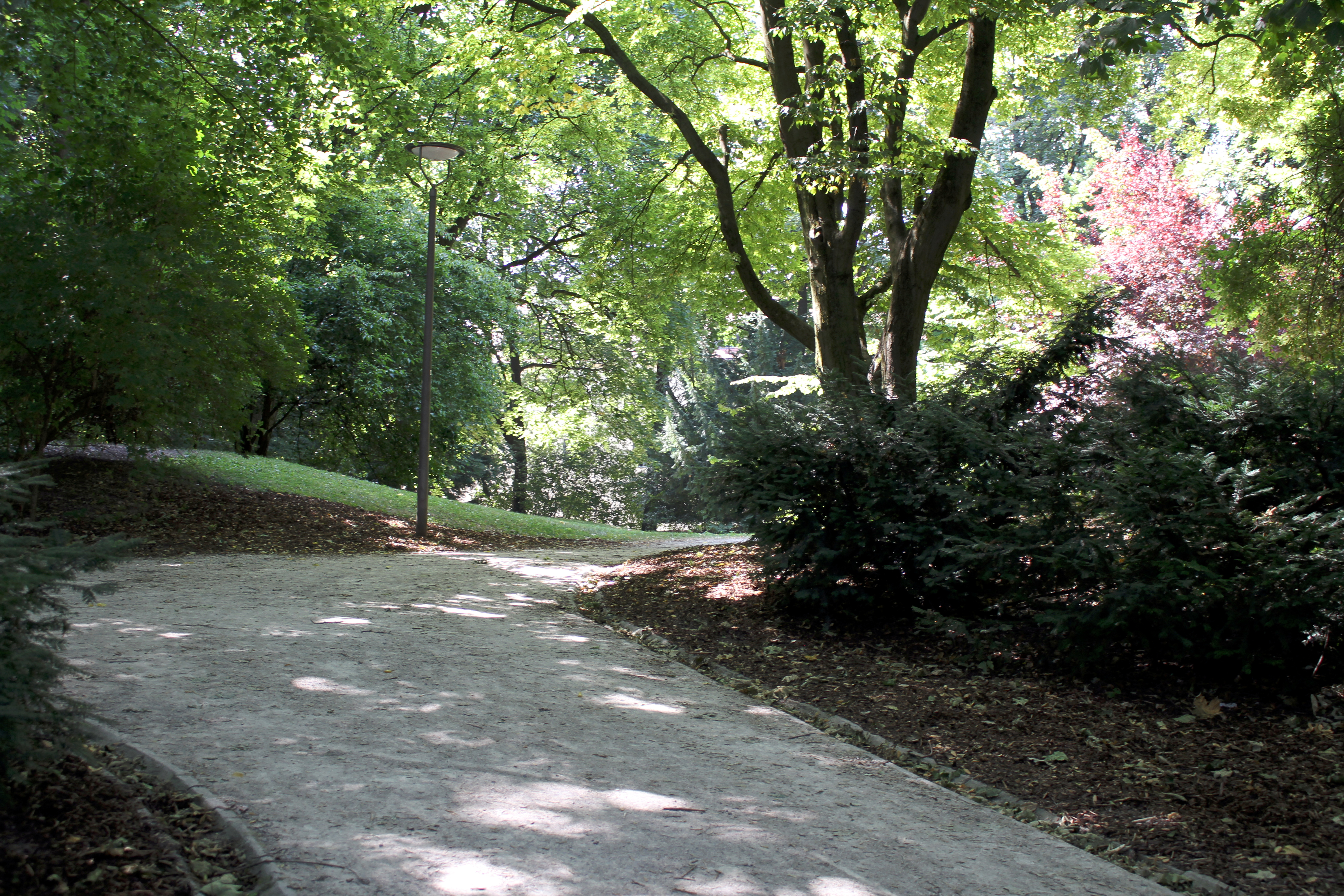 Finanzgarten, München, Germany